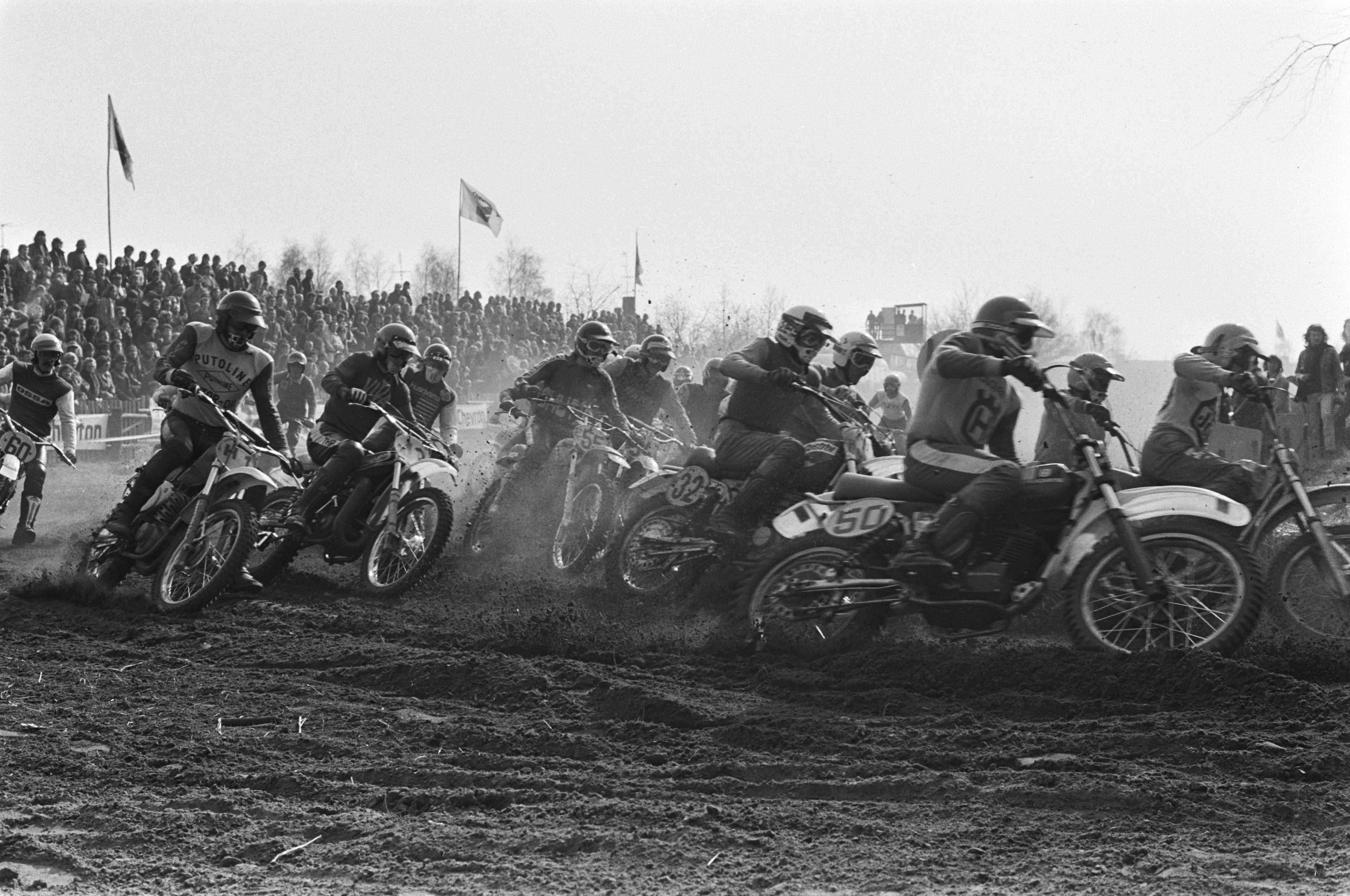 Collectie / Archief : Fotocollectie Anefo Reportage / Serie : [ onbekend ] Beschrijving : Internationale Motorcross in St. Anthonis ; start van de motocross Datum : 14 maart 1976 Trefwoorden : MOTORCROSS Fotograaf : Mieremet, Rob / Anefo Auteursrechthebbende : Nationaal Archief Materiaalsoort : Negatief (zwart/wit) Nummer archiefinventaris : bekijk toegang 2.24.01.05 Bestanddeelnummer : 928-4647 Claude Jobé (Ossa, 60), Håkan Andersson (Montesa, 43), Brad Lackey (Husqvarna, behind Andersson), Heikki Mikkola (Husqvarna, 50), Toon Karsmakers (Maicco, 32)